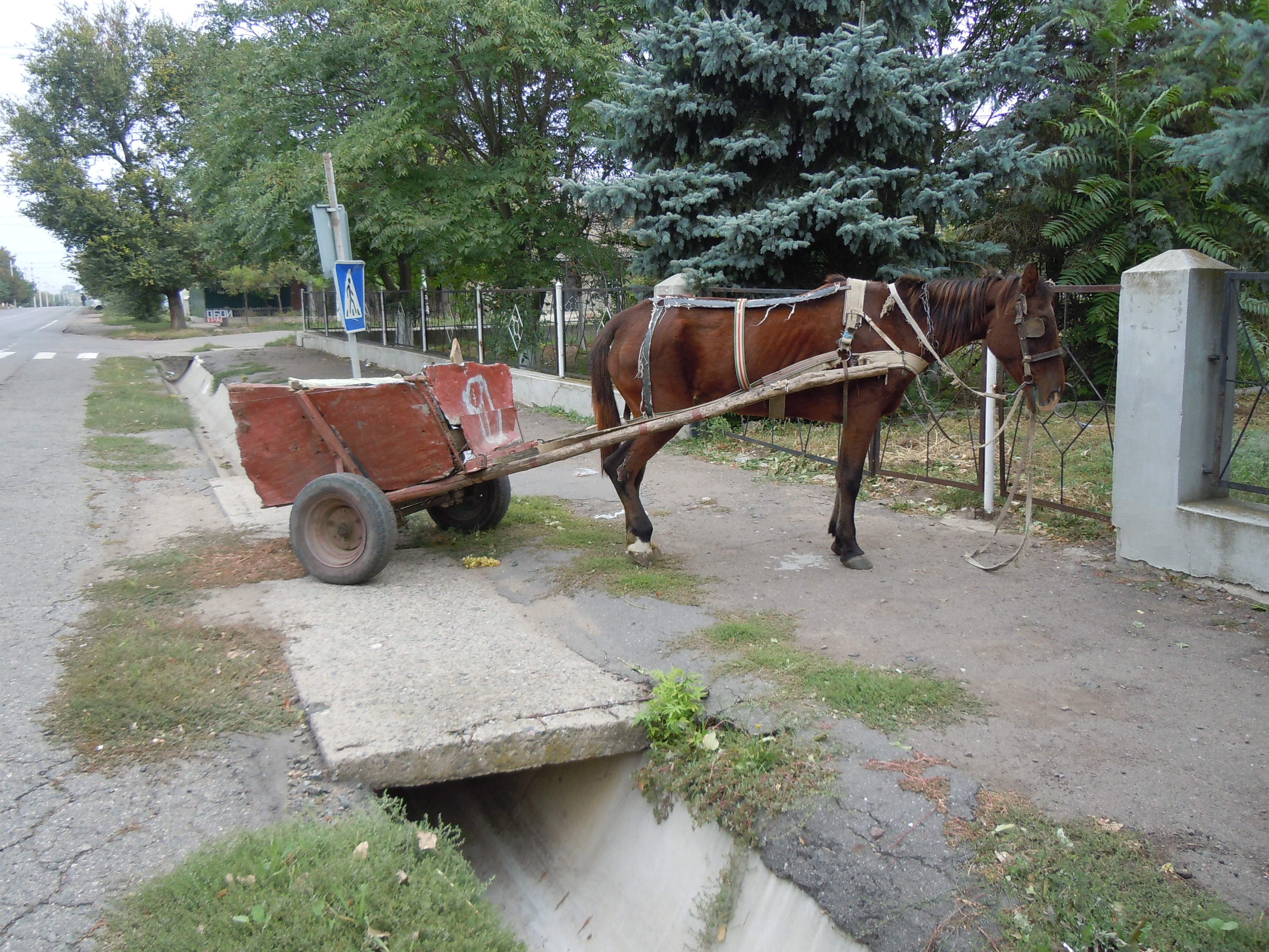 Село Зоря, Саратський район, Одеська область